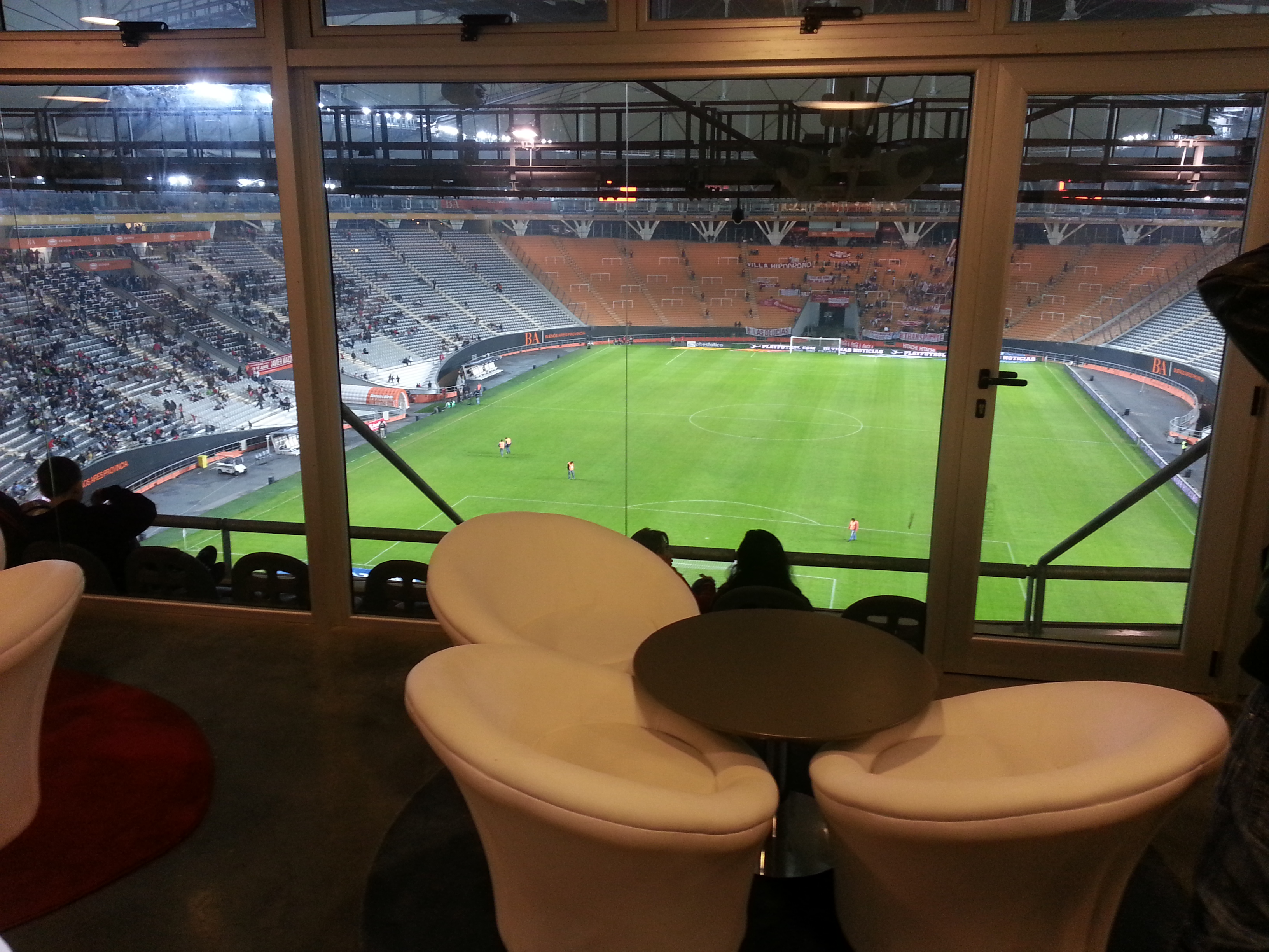 Estadio Unico de La Plata - Palcos Cabecera Norte